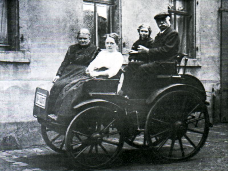 Louis Tuchscherer (1847-1922) auf seiner "Kutsche ohne Pferde", Datierung umstritten: 1880 oder nach 1900?